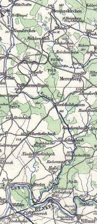 Ausschnitt einer historische Karte des unteren Lahntales, 1906 des Bereiches der Kerkerbachbahn